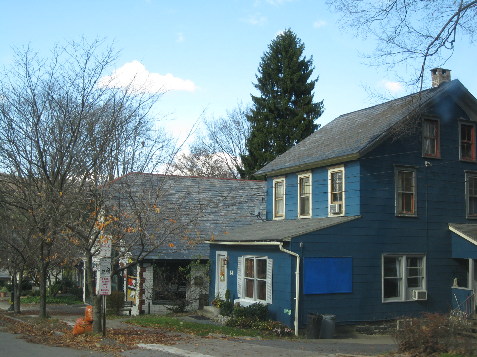 Delaware Water Gap, Pennsylvania